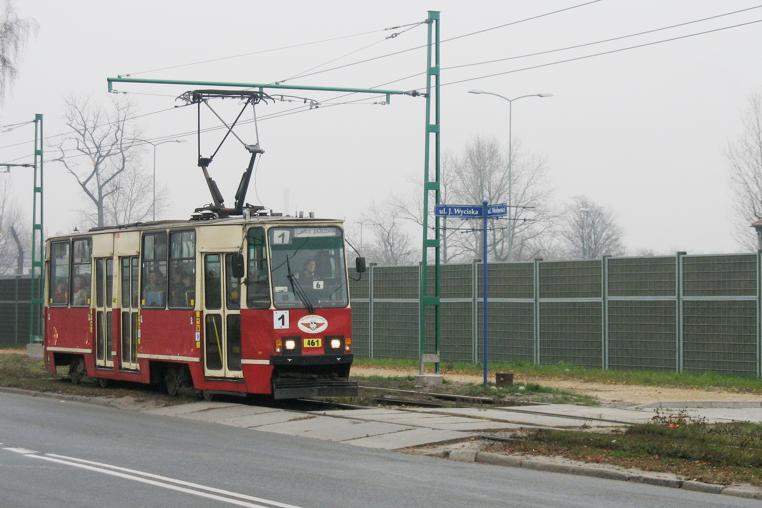 Tramwaj Konstal 105Na numer 461 na skrzyżowaniu ulic Wyciska i Wolności.